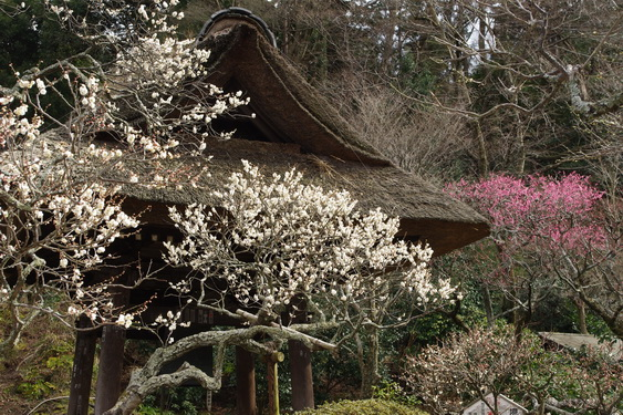 東慶寺の鐘楼。